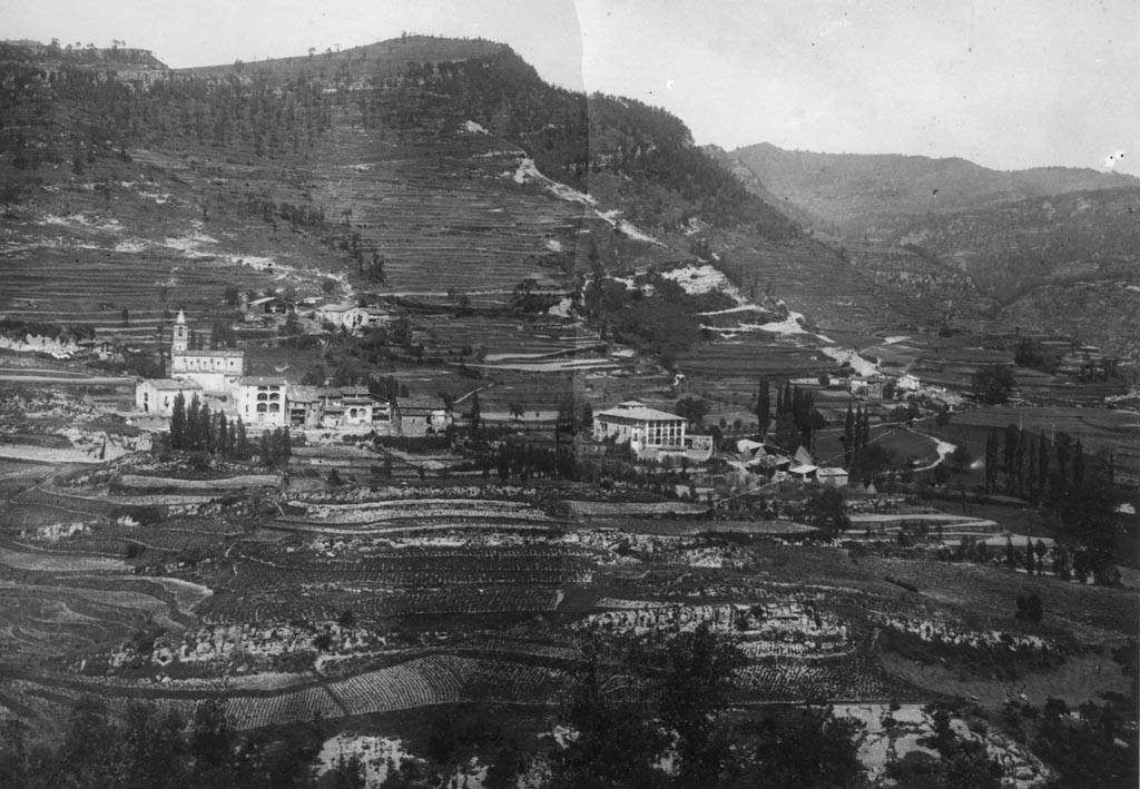 Vista general de Vidrà i de Cal Cavaller. Lluís Vila i d'Abadal (Entre 1910 i 1936)